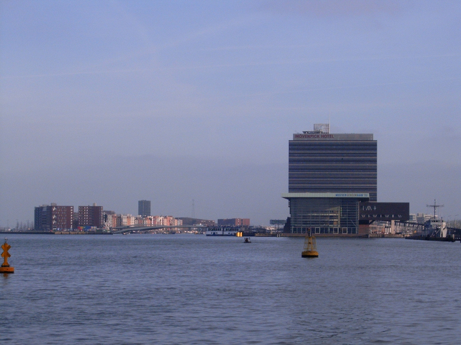 Oostelijk havengebied van Amsterdam